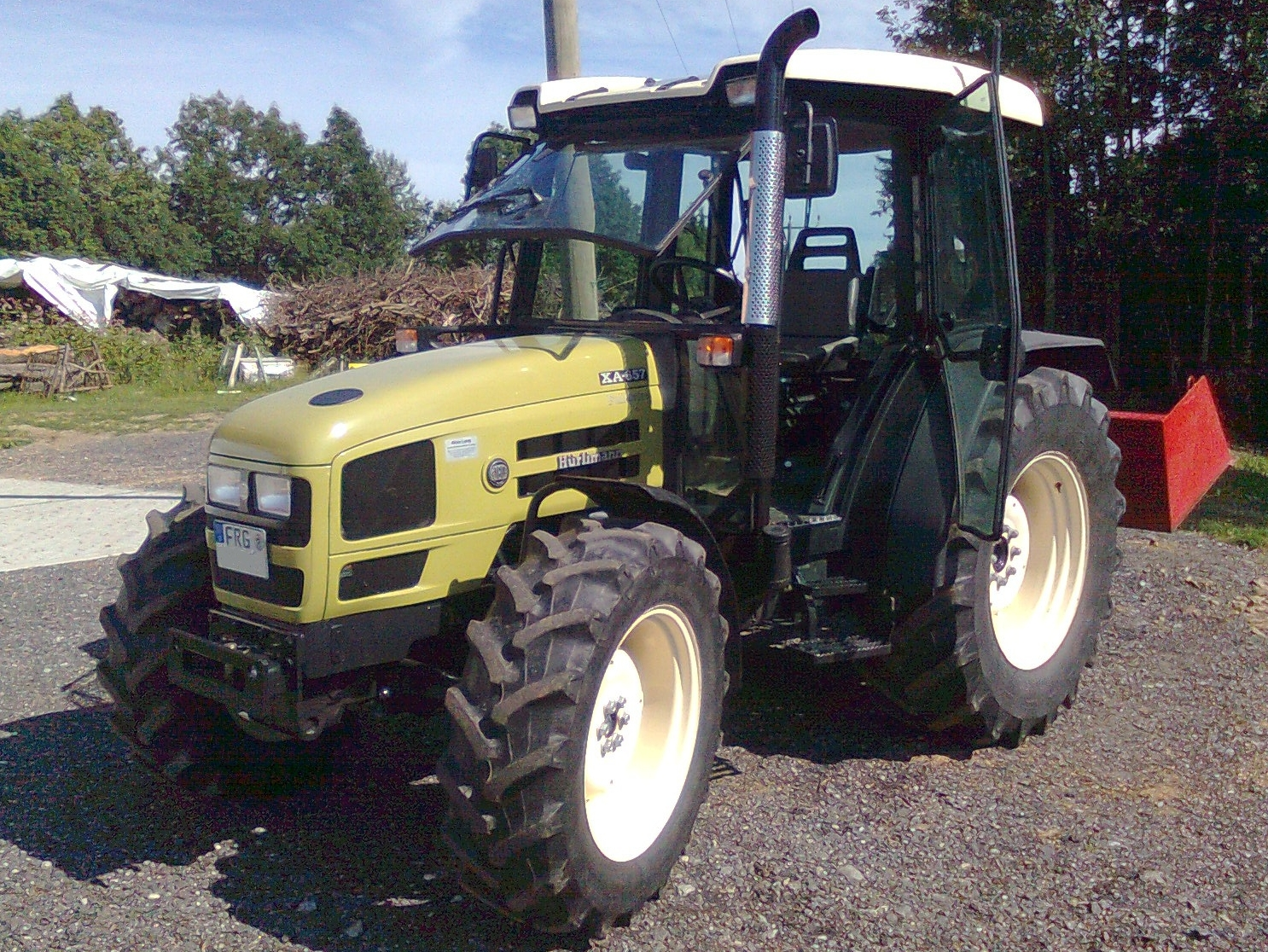 Hürlimann XA657 mit Heckschaufel.